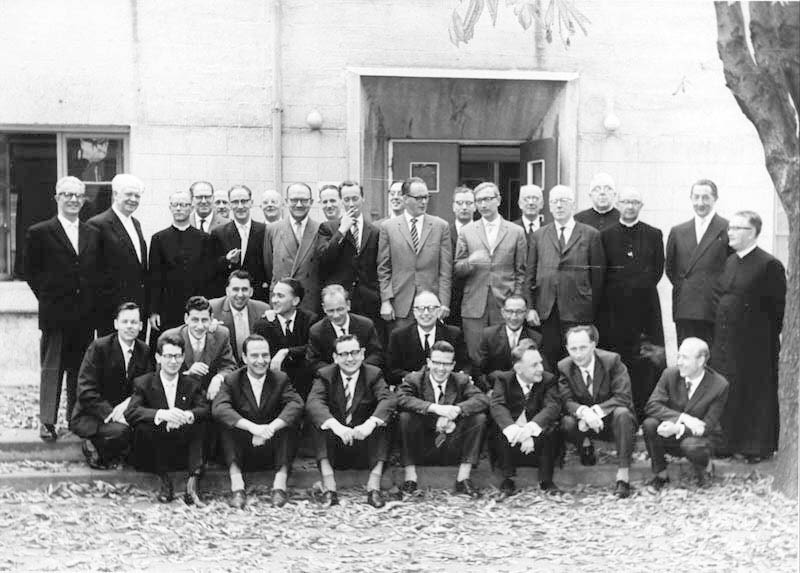 Leraren (inclusief enkele priesters) aan de Rooms-katholieke HBS in de Prof. Pieter Willemsstraat (PPW) in Maastricht in 1960. De school verhuisde in 1966 naar nieuwbouw en heette daarna Sint-Maartenscollege. Fotocollectie RHCL Maastricht, GAM 7108.